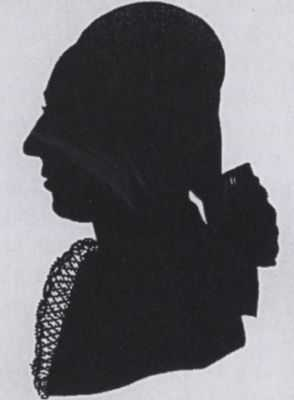 Caspar Friedrich Wolff, deutscher Mediziner und Embryologe, Scherenschnitt, vor 1770